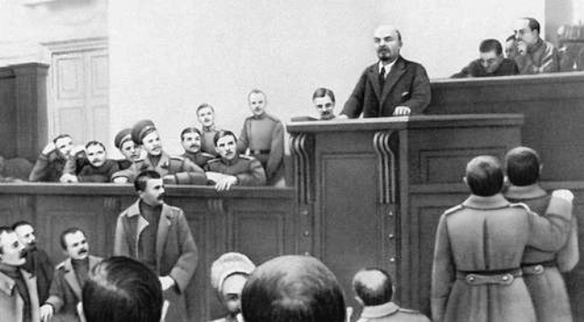 Выступление В. И. Ленина с Апрельскими тезисами в Таврическом дворце, с трибуны Петроградского Совета рабочих и солдатских депутатов (4 апреля 1917)